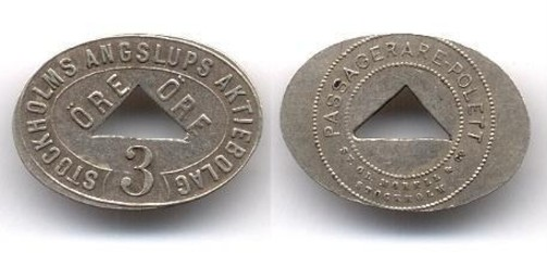 Ångslupspollett för Stockholms Ångslups AB